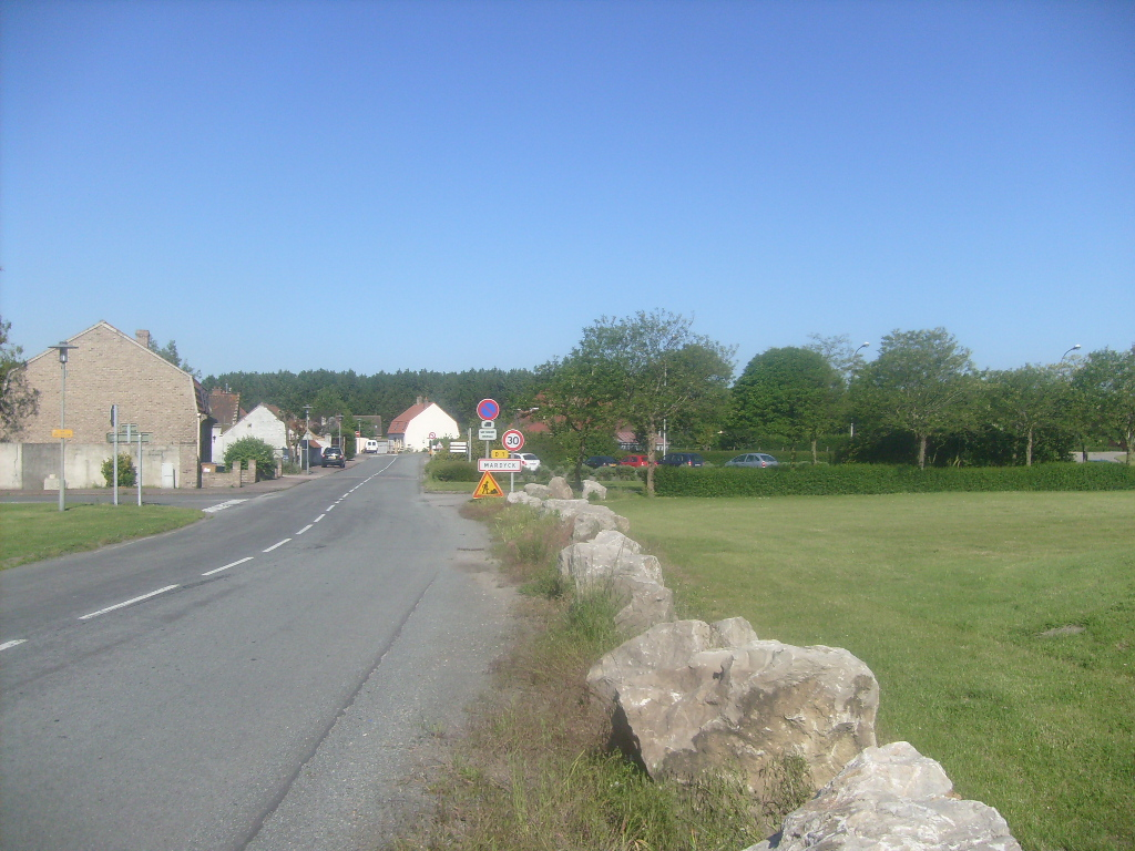 L'entrée du quartier de Mardyck à Dunkerque